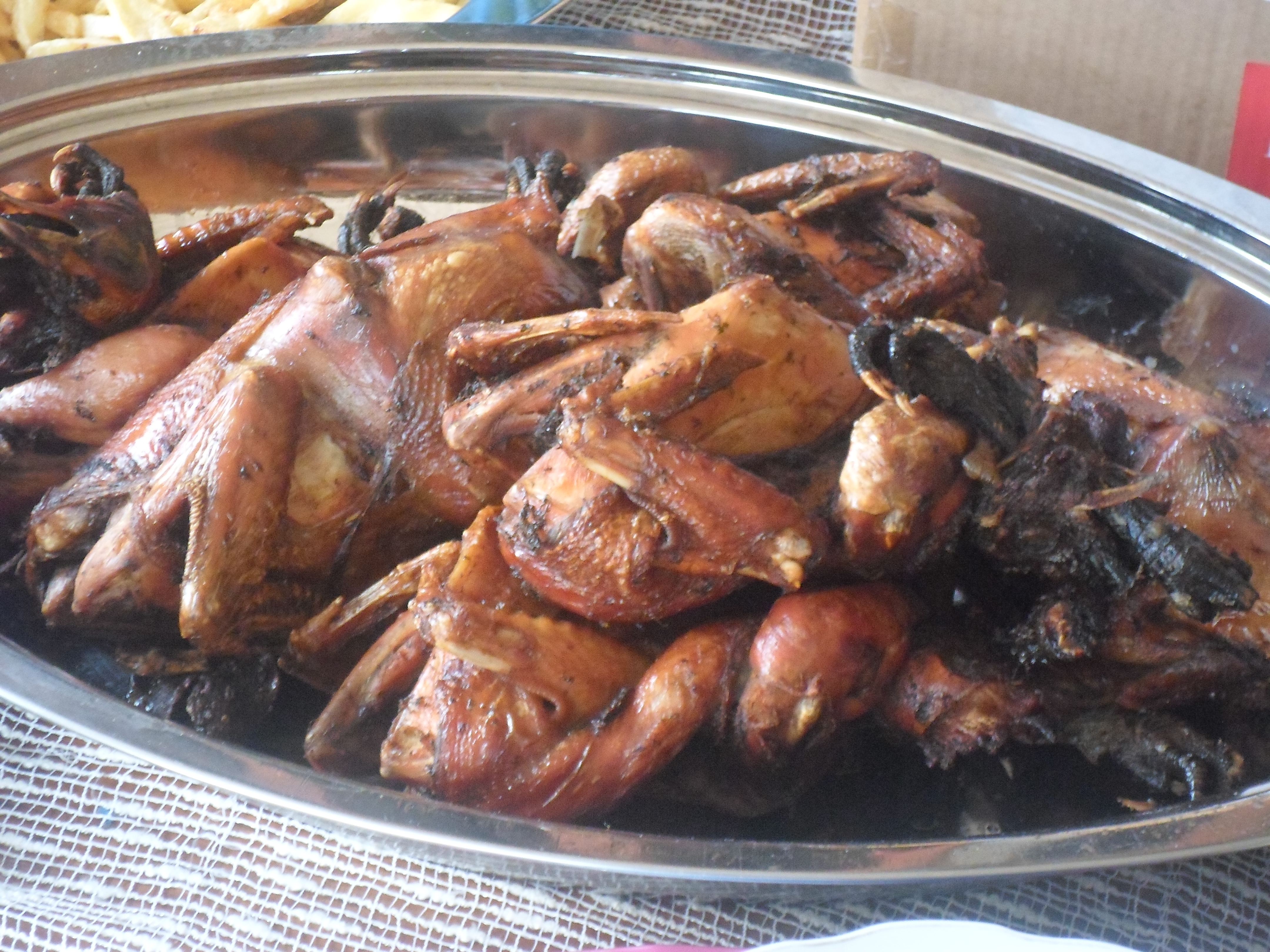 Recette : 1- Mariner le poulet avec les epices suivants : Ail, Percil, Laurier, Poivre et un peu de sel. 2- Boullir le poulet mariné jusqu'à cuisson 3- Faire revenir le poulet dans l'huile bien chaude jusqu'à ce qu'il soit bien doré comme sur le photo et Bon apetti! This is an image of food from Burkina Faso